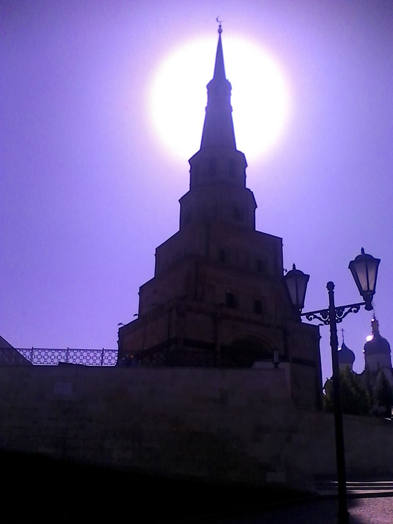 Башня Сююмбике в Казани